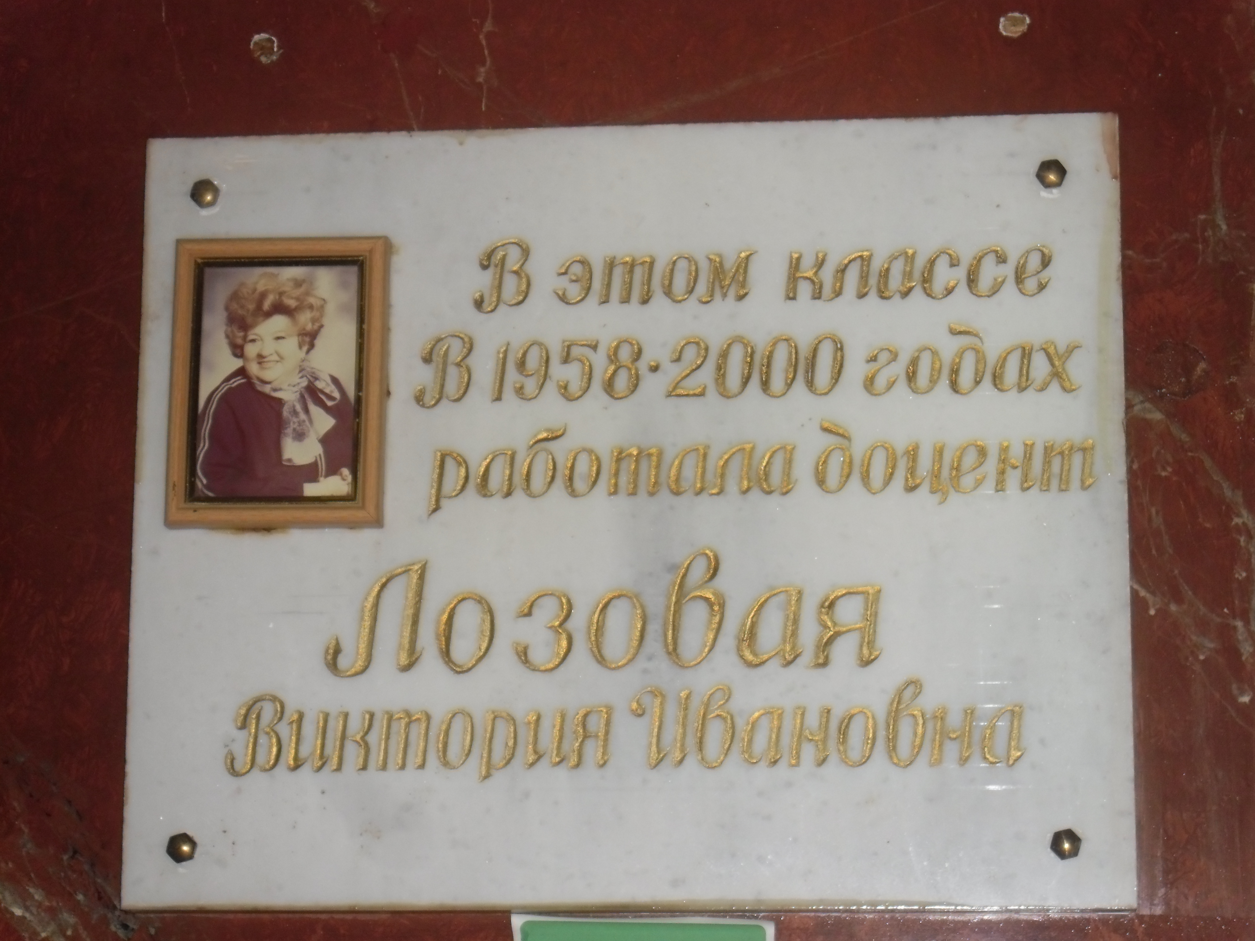 Мемориальная доска в Харьковском университете искусств